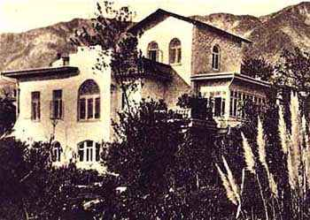 фото 1899 год